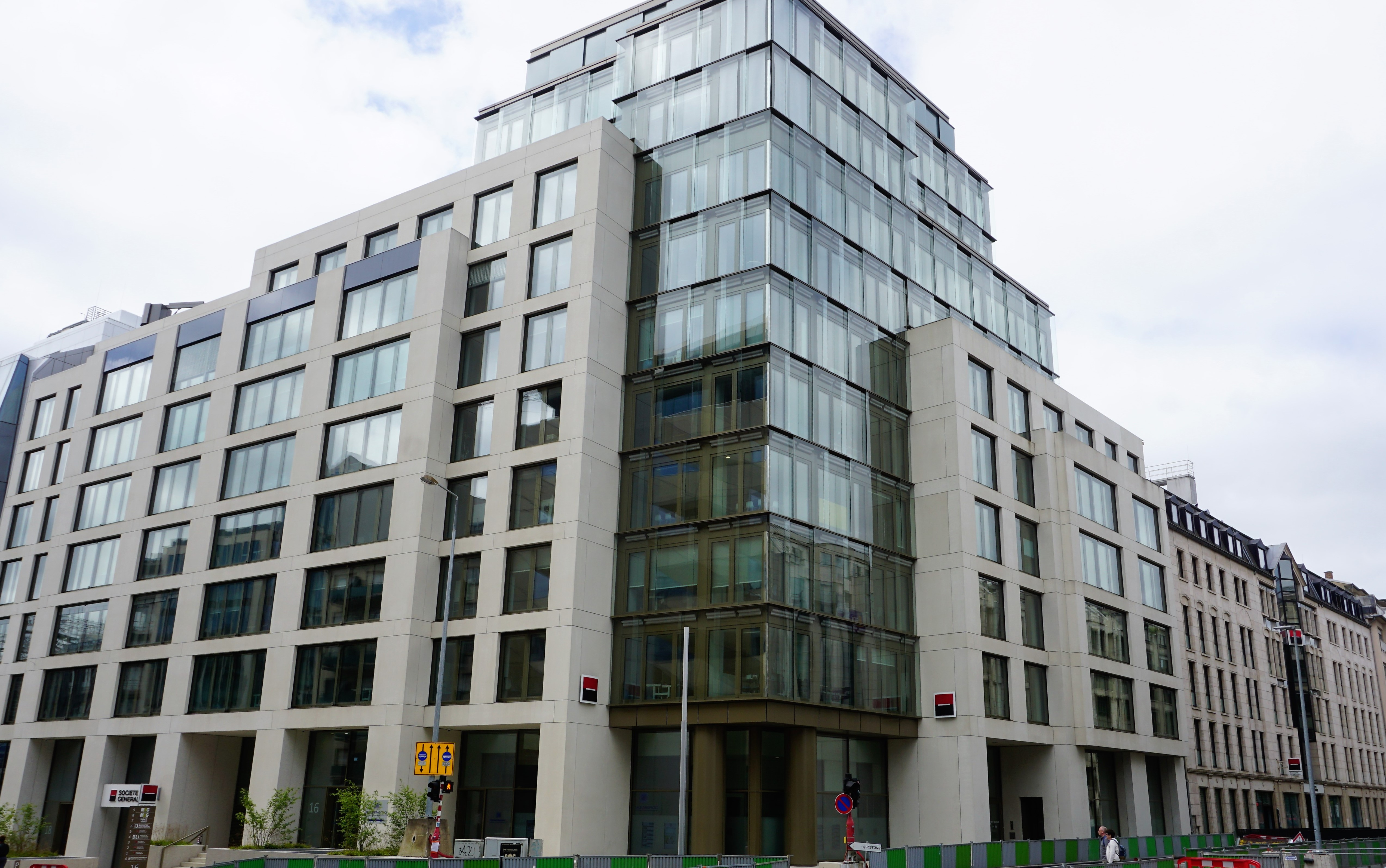 Luxembourg, immeuble administratif Carrefour.